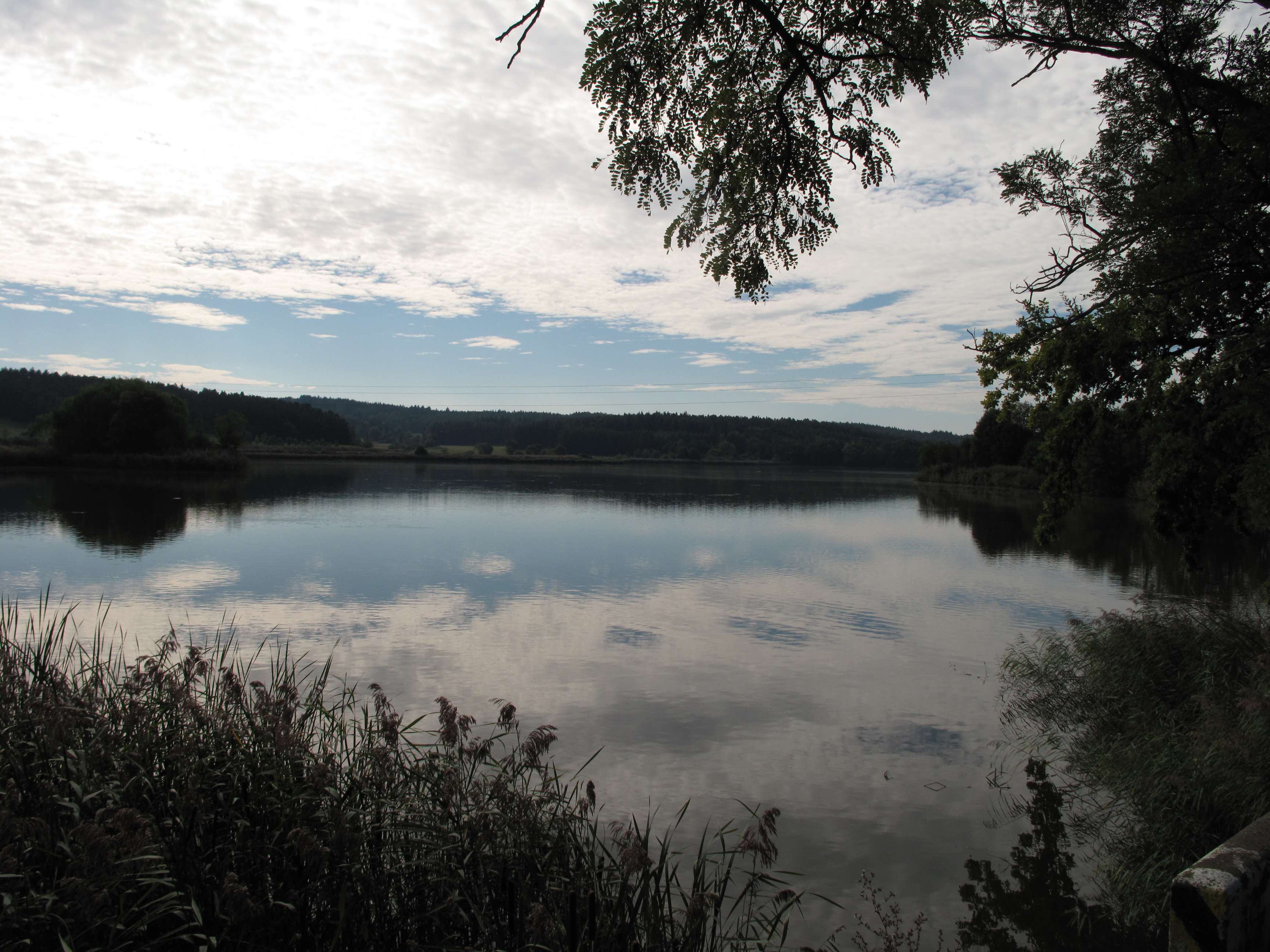 Prostřední Putim. Okres Písek, Česká republika.